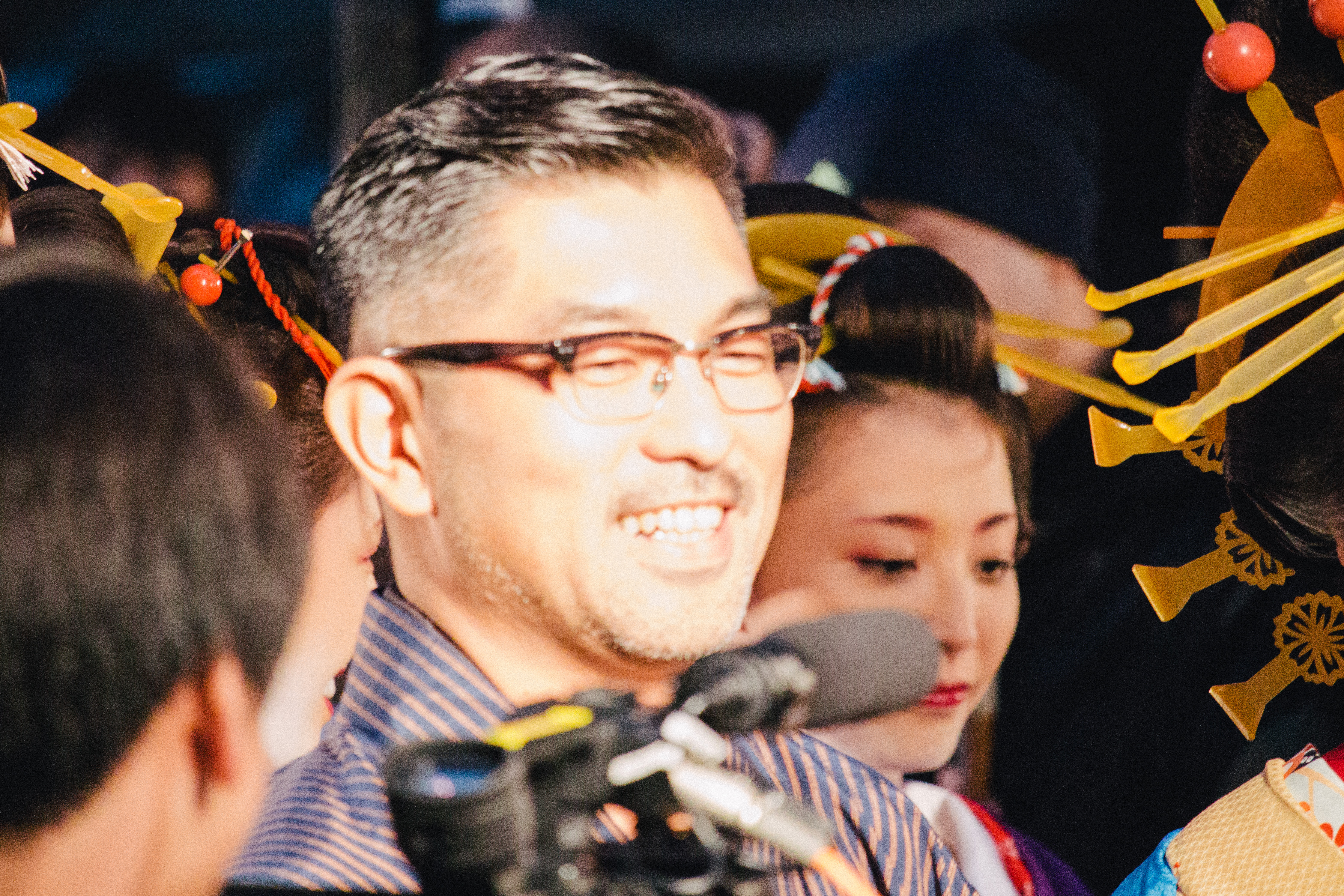 第27回 東京国際映画祭 豊島圭介 (花宵道中)